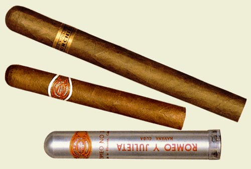 Romeo y Julieta Cigar